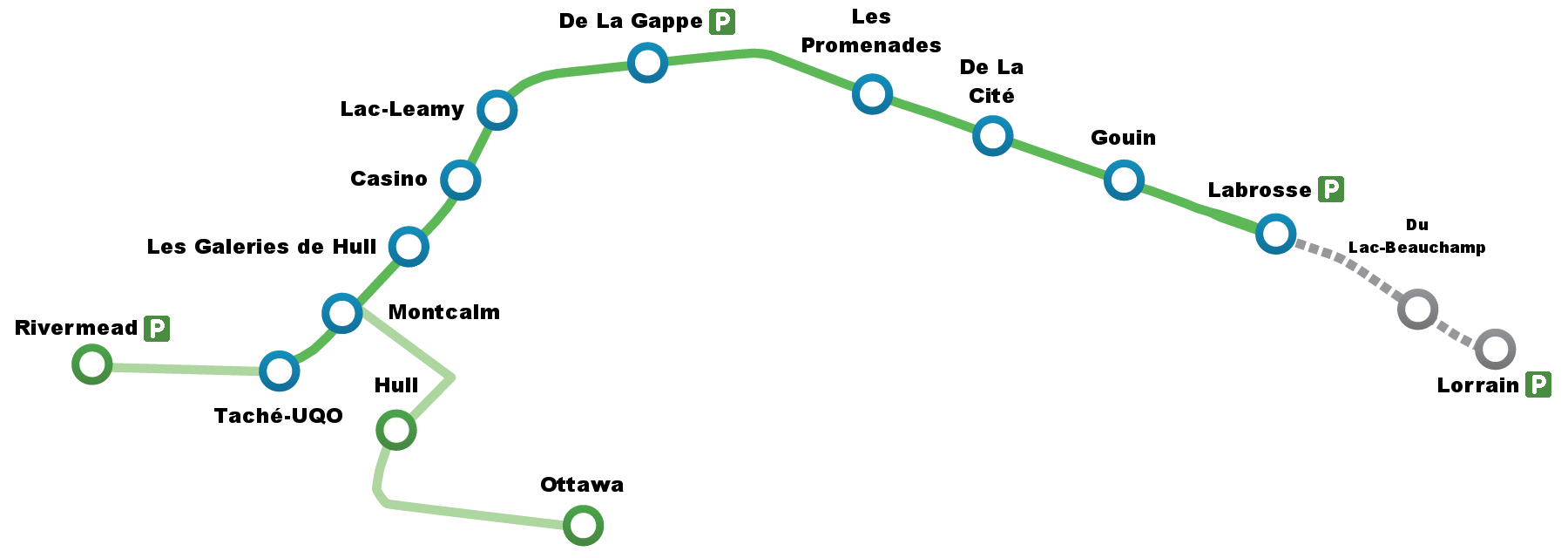 Le parcours du Rapibus de la Société de Transport de l'Outaouais.